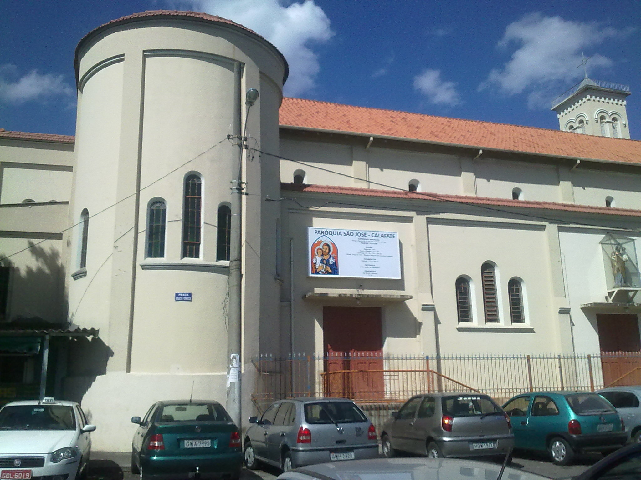 Paróquia São José no bairro Calafate, em Belo Horizonte, Brasil.